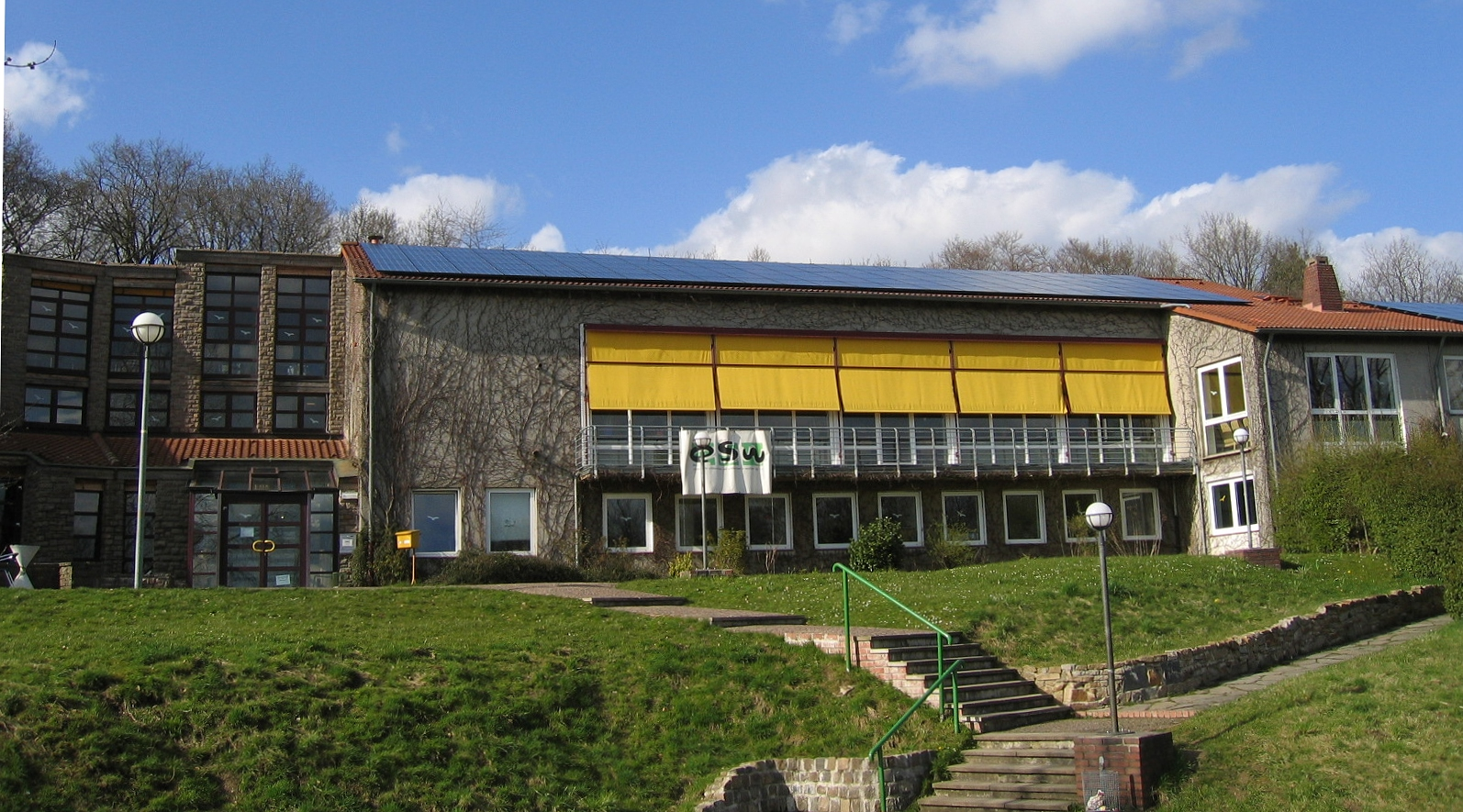 Evangelische Jugendbildungsstätte Berchum (Kurt-Gerstein-Haus) in Hagen-Berchum.